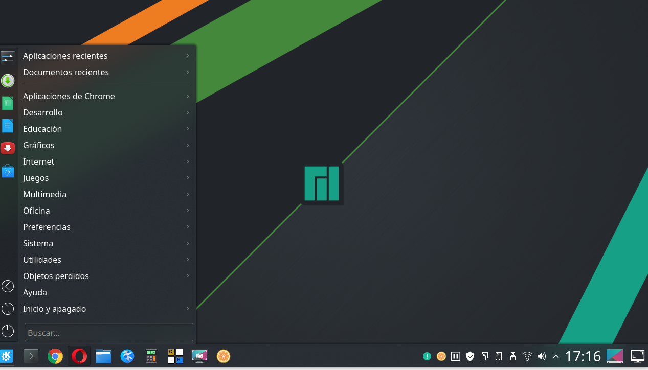 Captura de pantalla del escritorio de Manjaro Linux KDE 20.0 "Lysia"